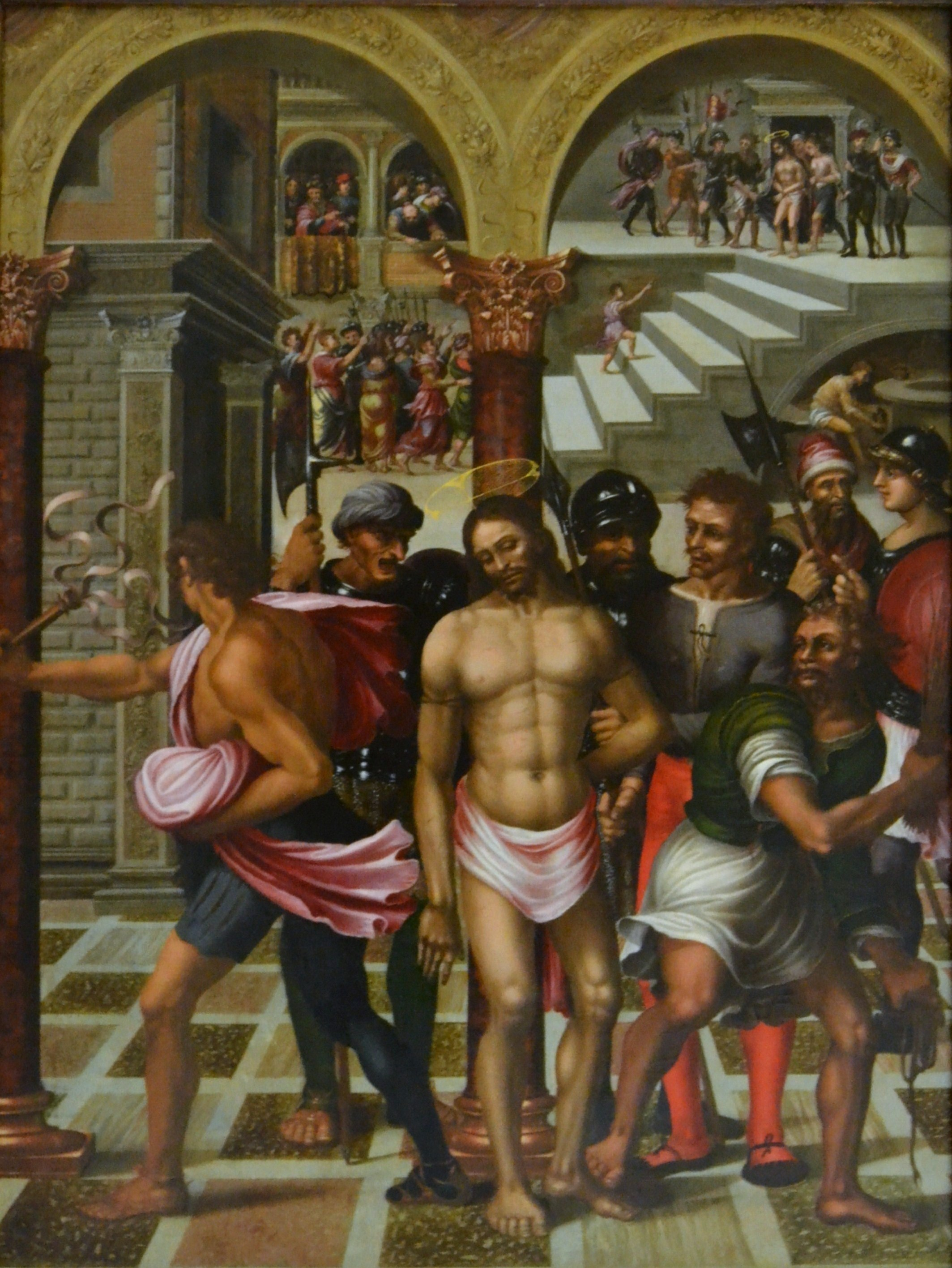 Flagellation